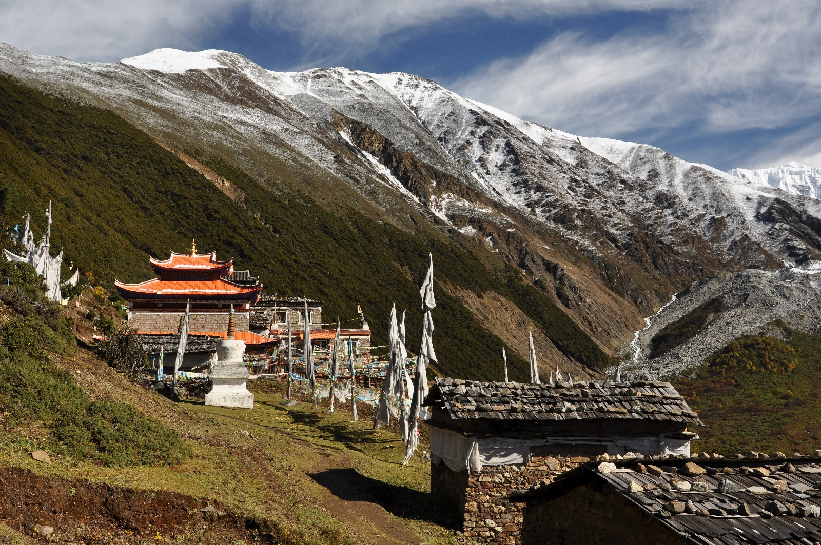 Konka Gompa